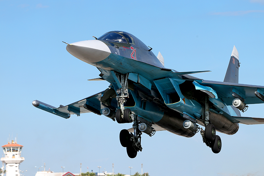 Будни авиагруппы ВКС РФ на аэродроме Хмеймим в Сирии